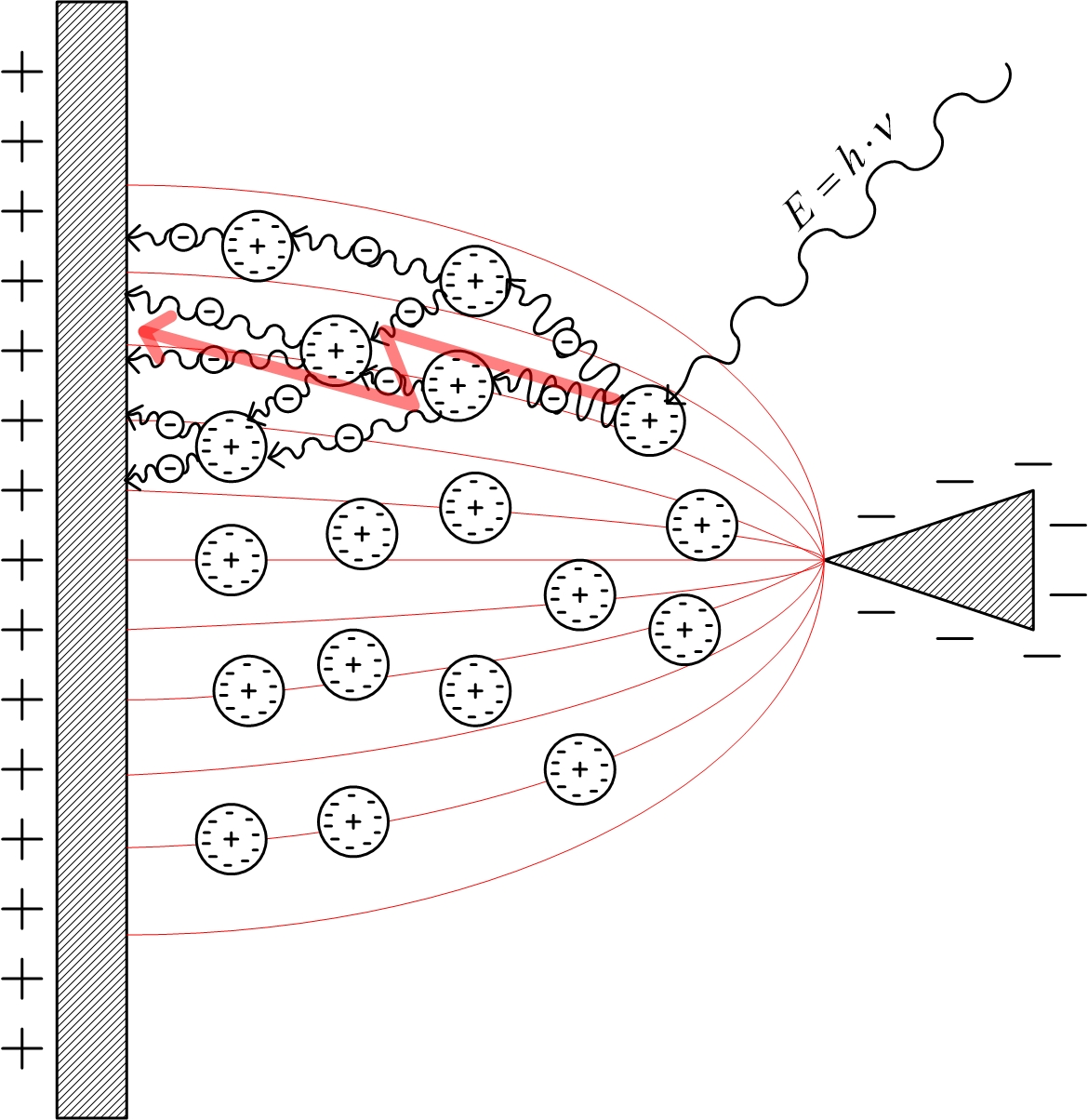 Entstehung einer Teilentladung in einer Spitze-Platte-Elektrodenanordnung ausgelöst durch einfallende Strahlung